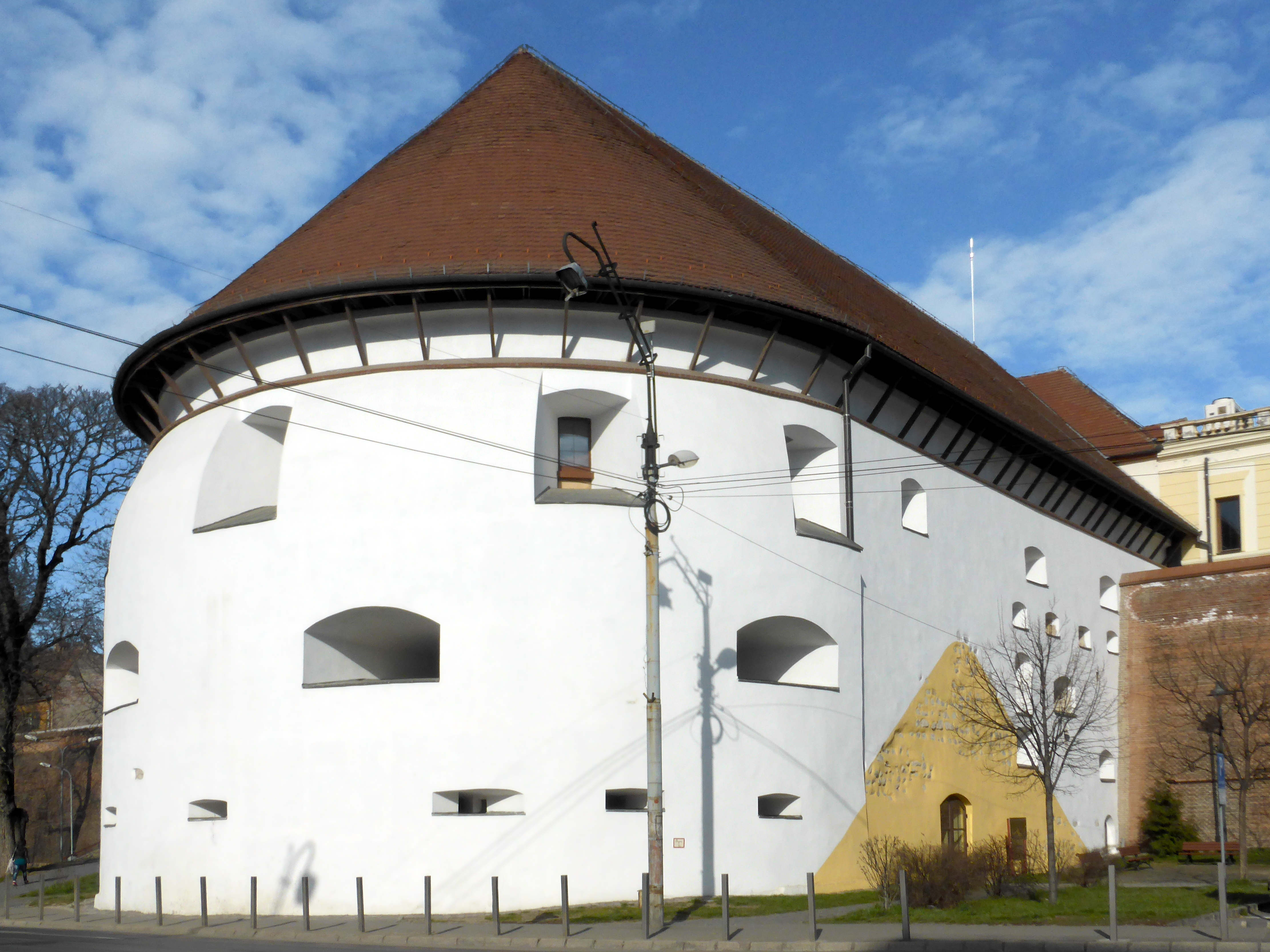 Hermannstadt, der Dicke Turm von Osten gesehen.